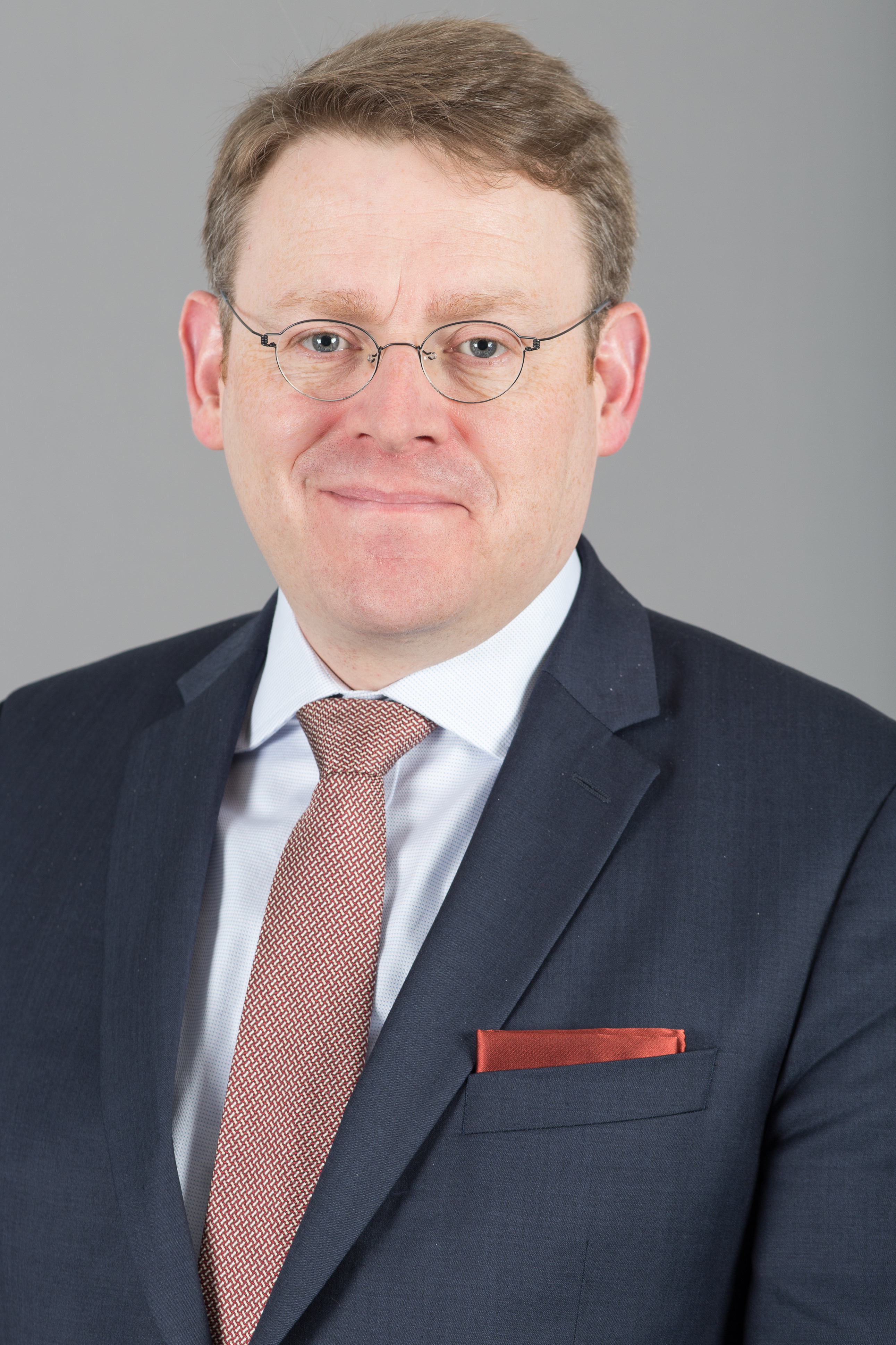 Christian Carius